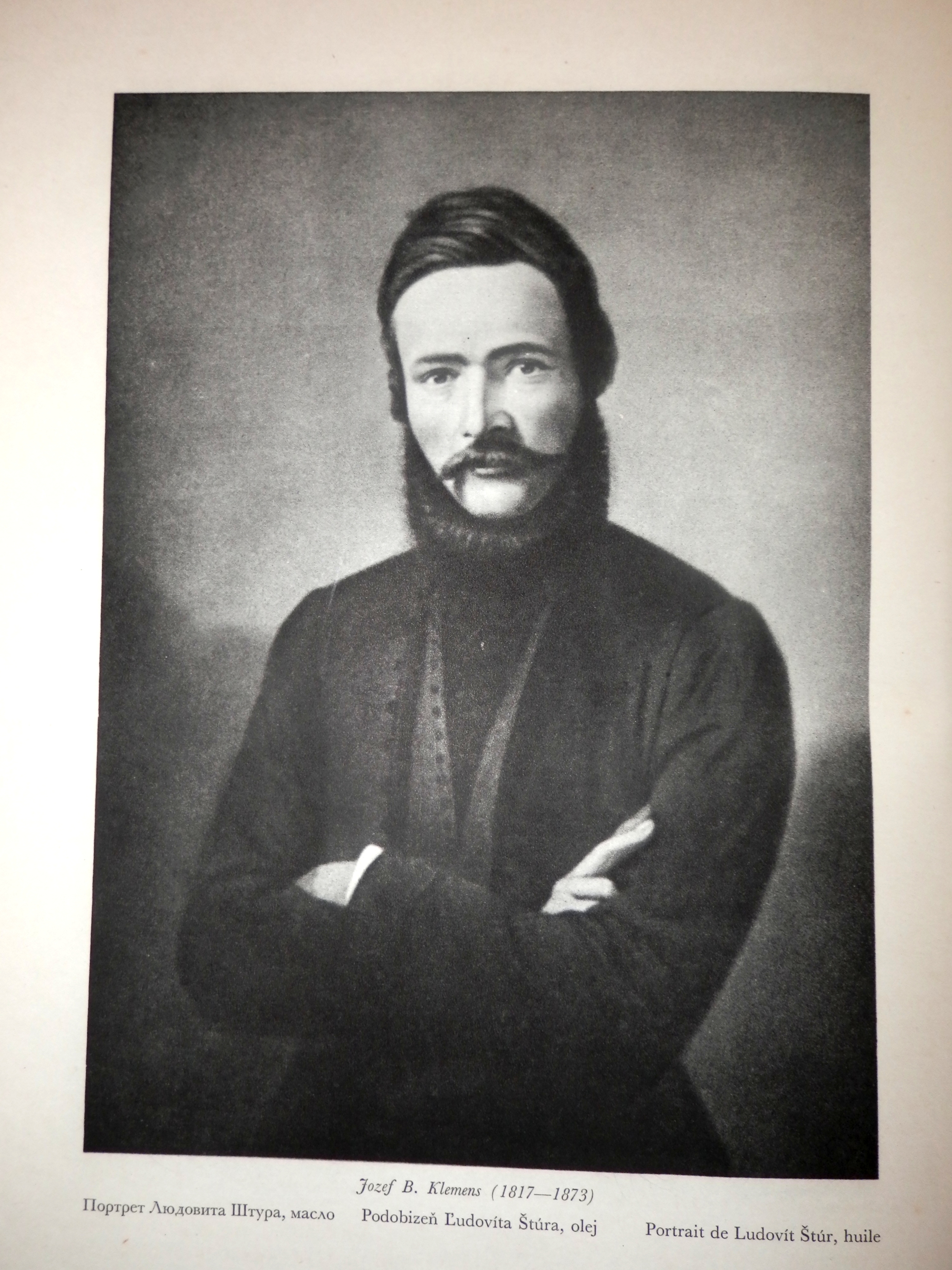 Slovenské výtvarné umenie. Digitalizácia obrázku – Podobizeň Ľ.Štúr. Autor výtvarného diela: Jozef B. Klemens. Slovensko.